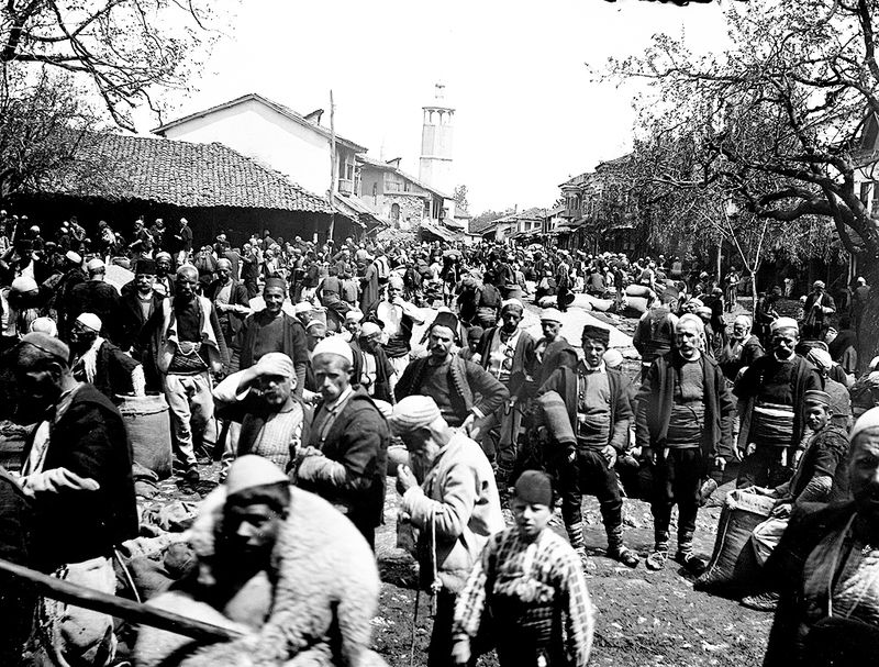 Пазар в Гостивар.